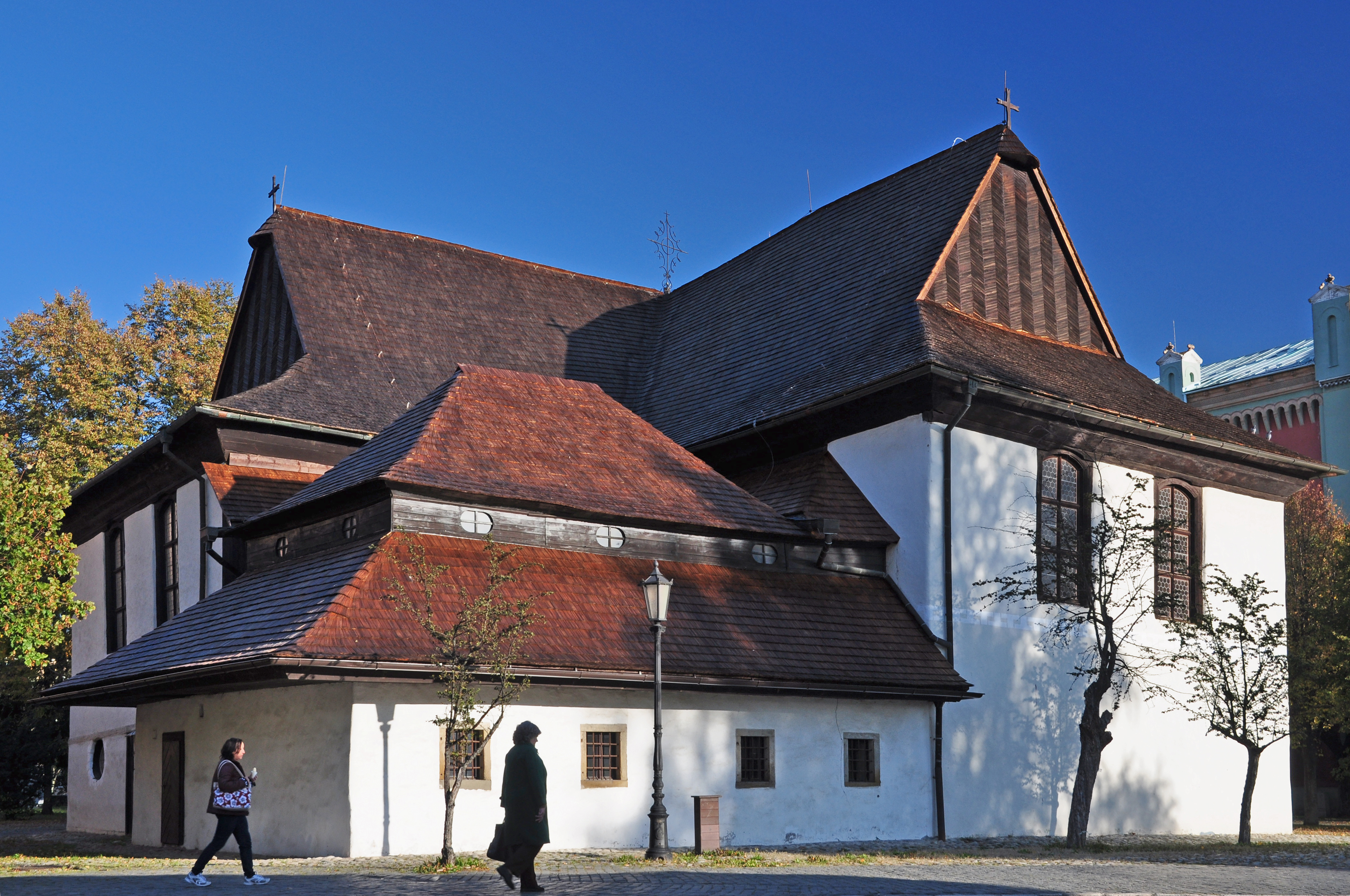 Evanjelický kostol v Kežmarku